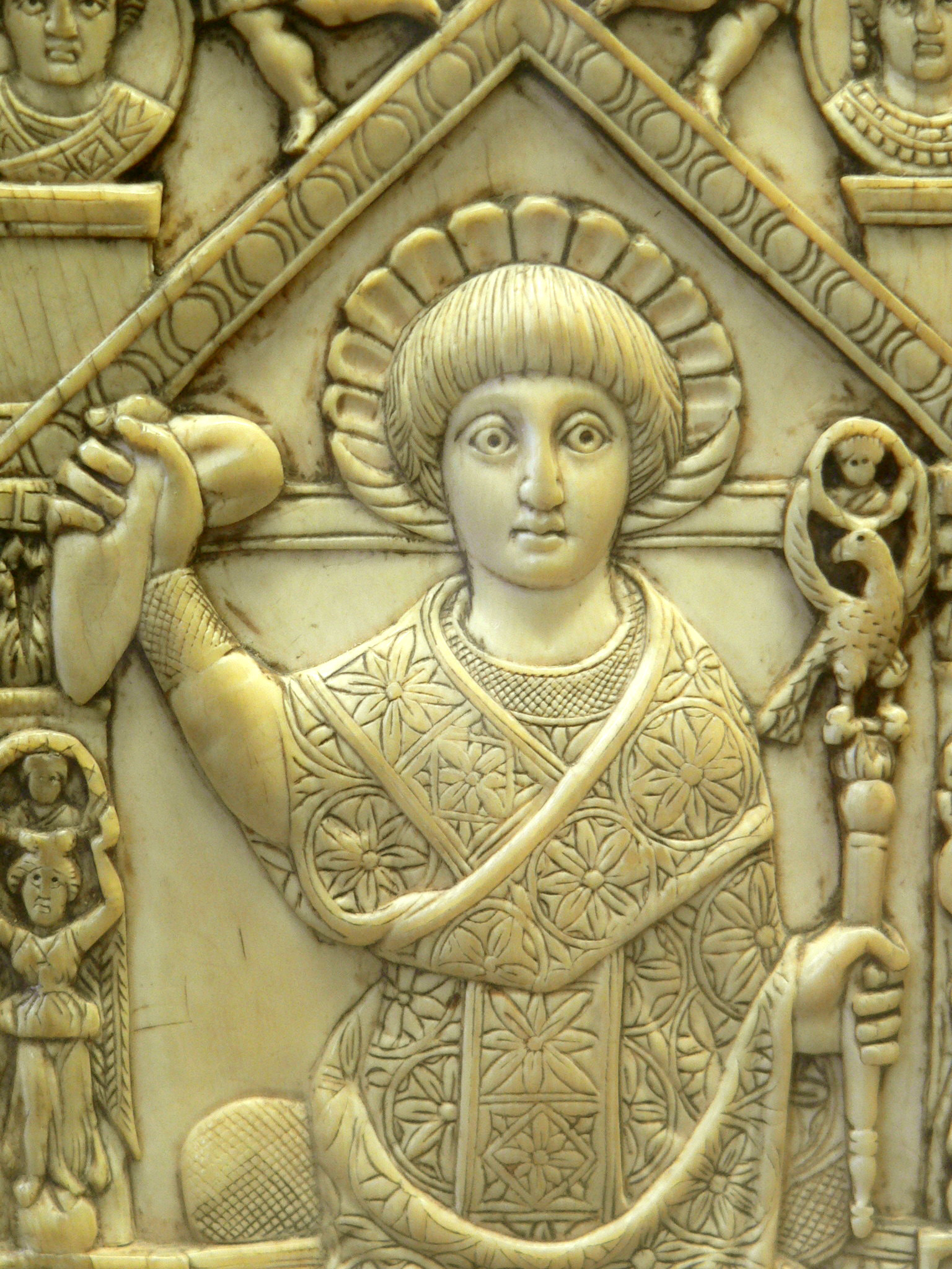 Diptyque de Flavius Anastasius Probus Diptyque, feuillet gauche. Consul en 517, Constantinople, Ivoire d'éléphant, Ancien trésor de Saint-Etienne de Bourges.